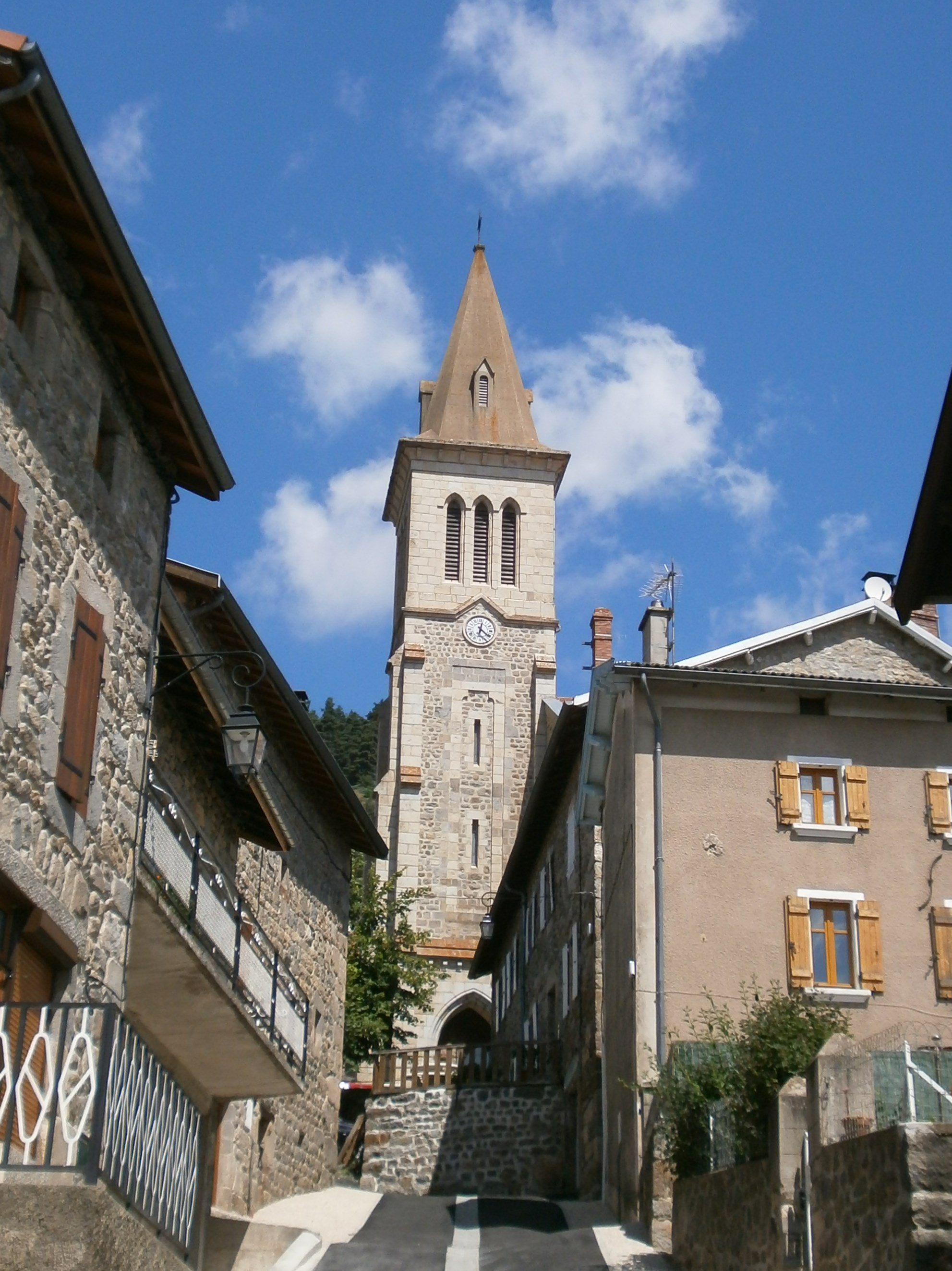 Rochepaule, vers l'église